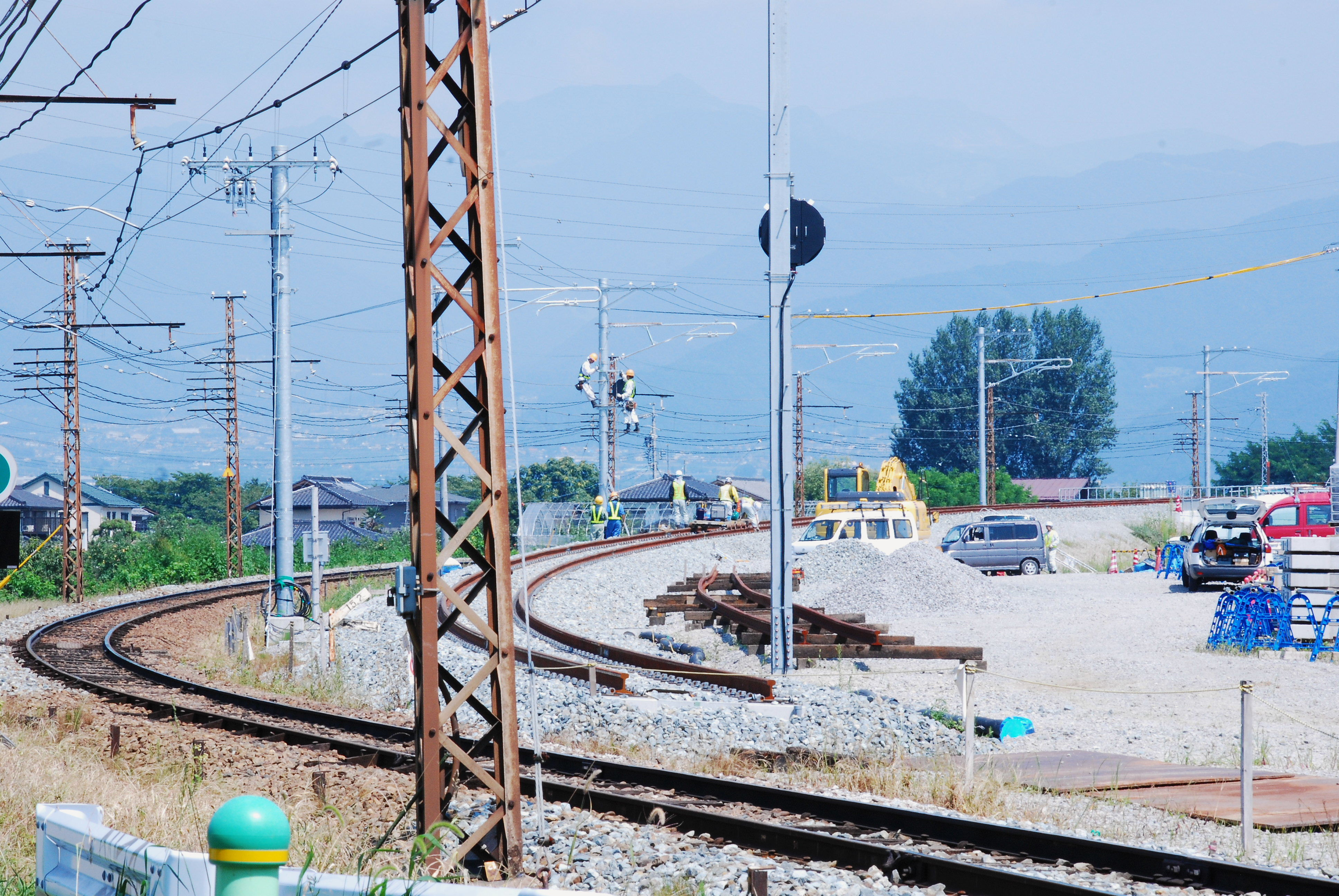 長野電鉄長野線の村山橋（2009年8月現在の建設作業の様子）。 現在、急ピッチで建設が進められている架け替え作業の状況。これは長野方からの建設状況。